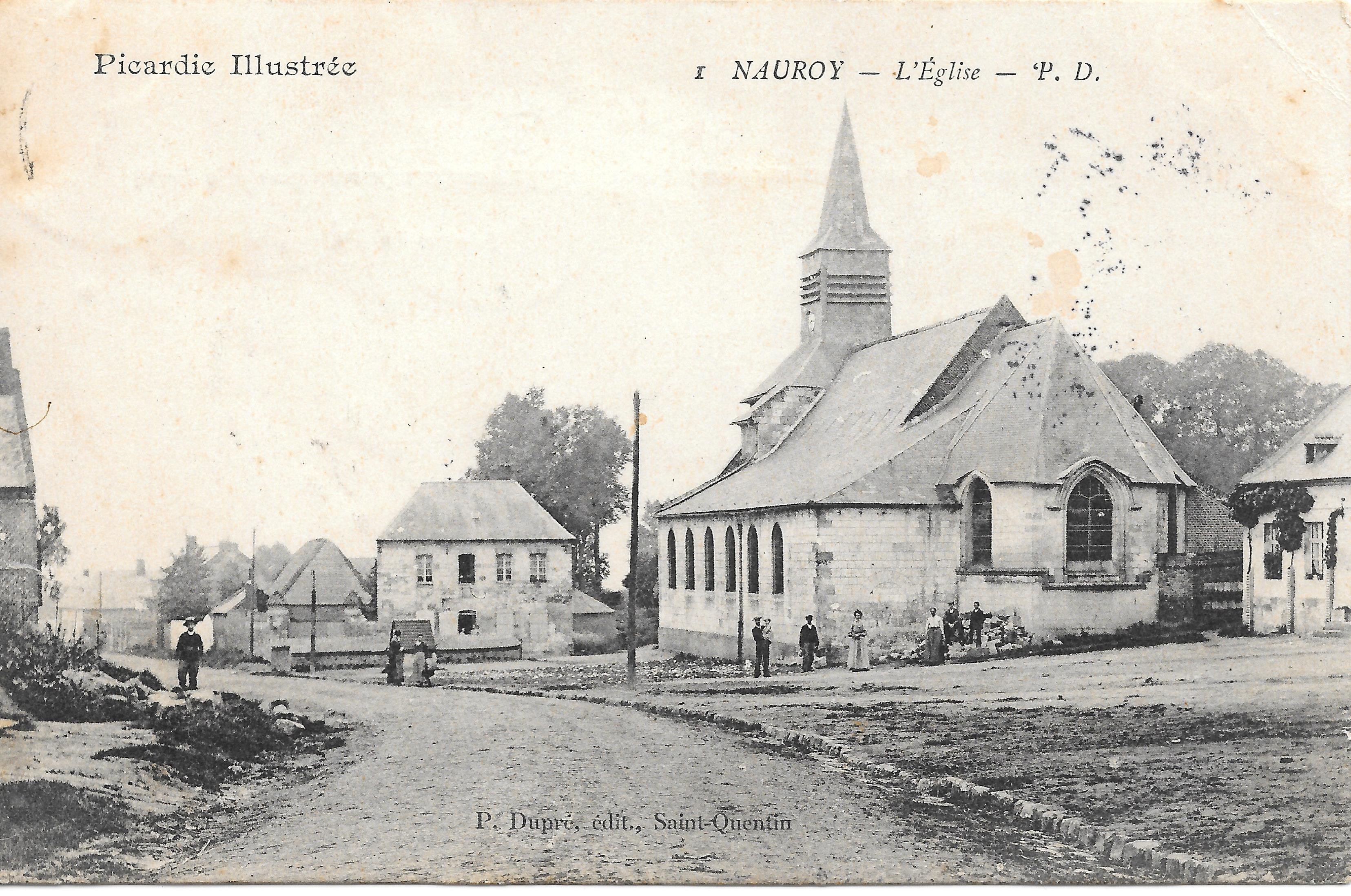 Carte postale